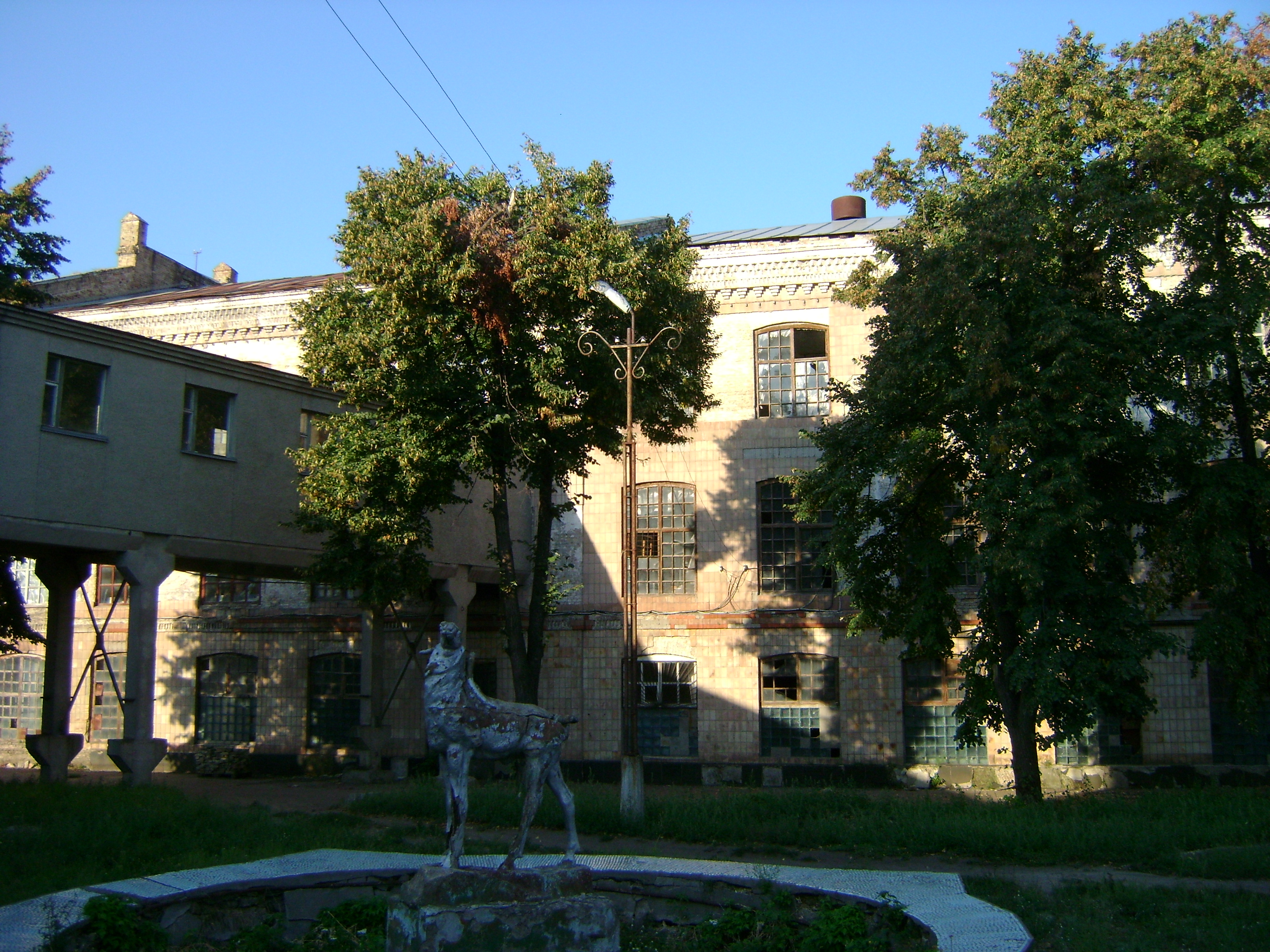 Рафінадний завод (мур.), Черкаси, вул. Добровольського, 1